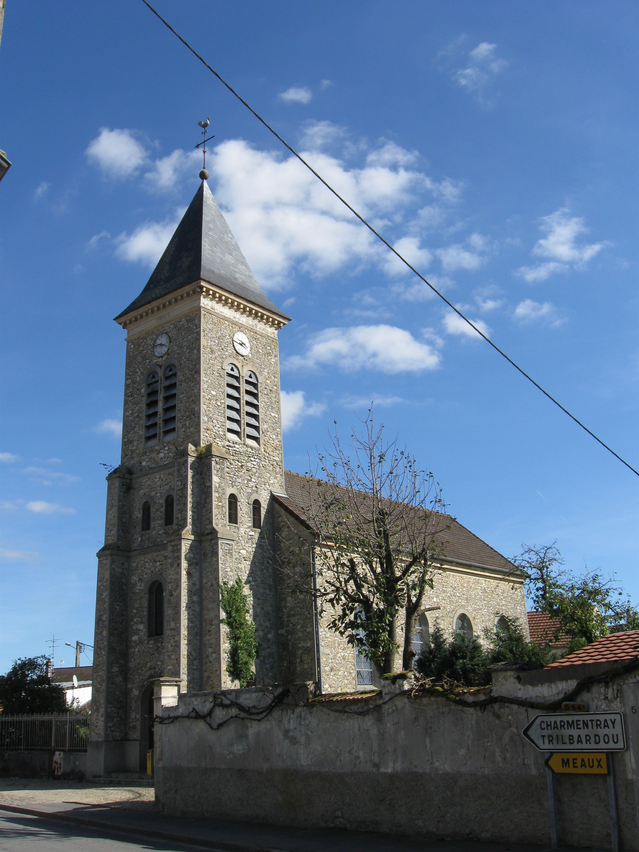 Église Saint-Pierre-et-Saint-Paul de Précy-sur-Marne. (Seine-et-Marne, région Île-de-France).